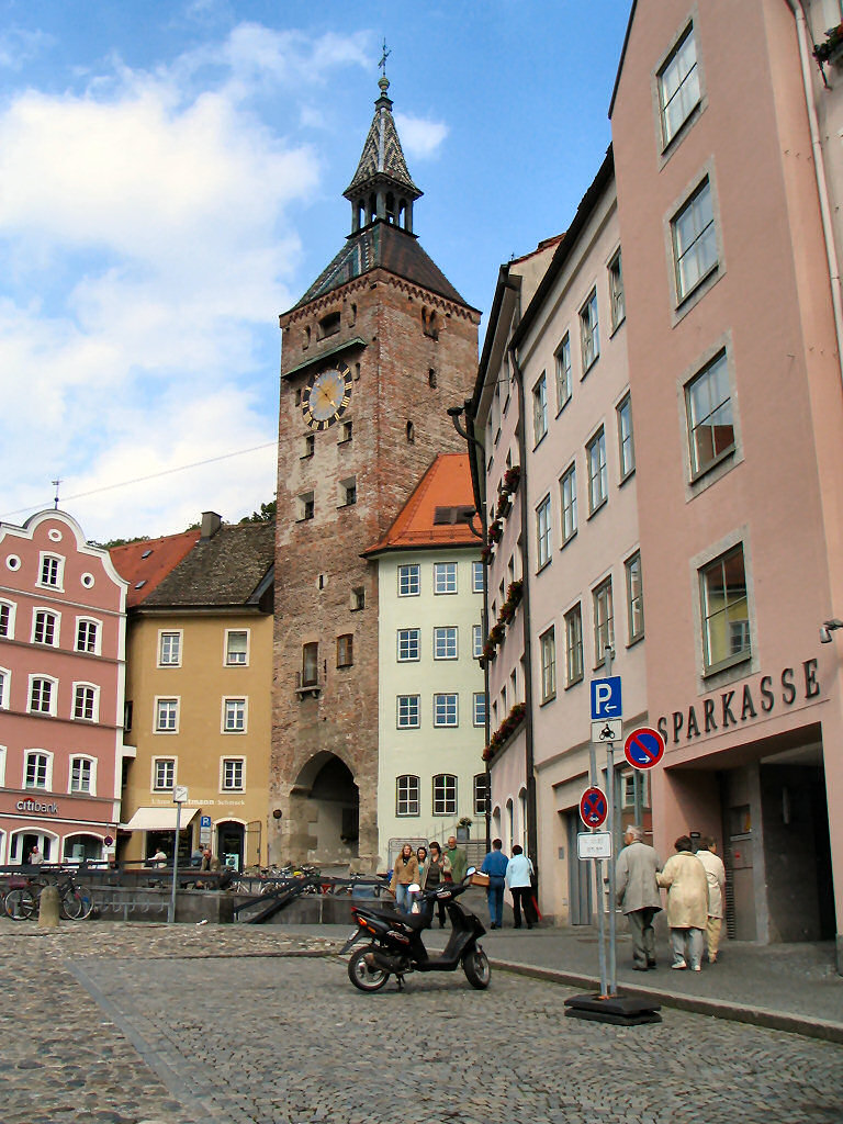 Beschreibung: Schmalzturm Landsberg am Lesch Quelle: selbst fotografiert Datum: 12. Juni 2005 Fotograf / Zeichner: Patrick Huebgen Kategorie:Bild:Torturm Kategorie:Landsberg am Lech